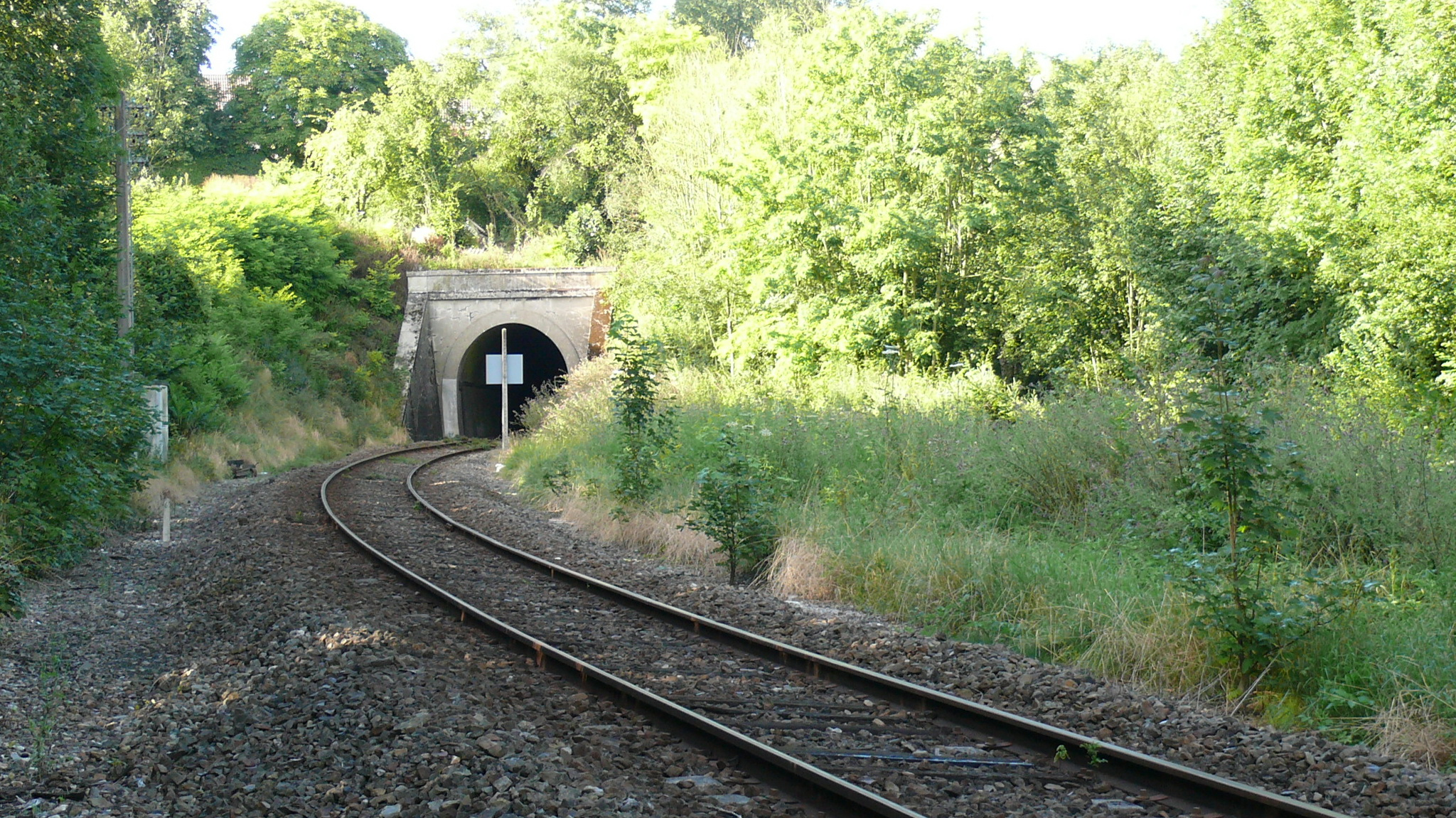 Marseille-en-Beauvaisis : entrée du tunnel (ligne Paris - Le Tréport)